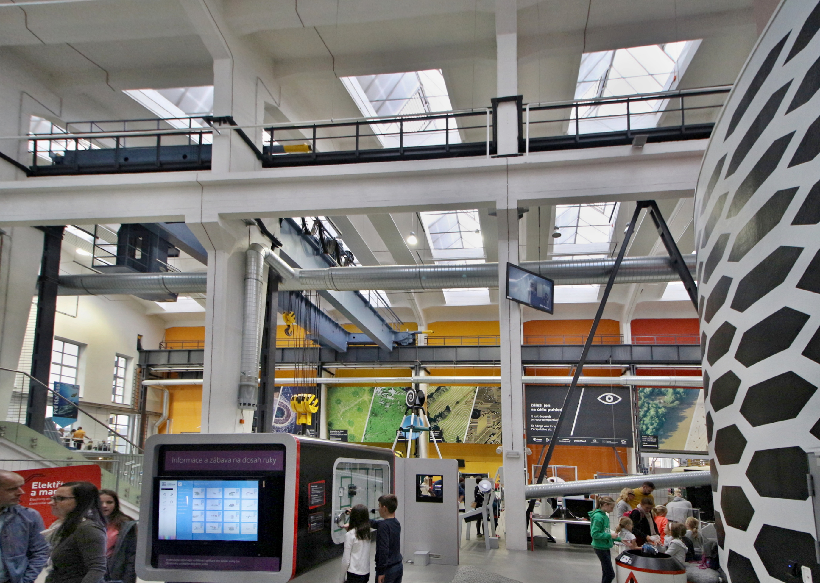 Plzeň TechMania